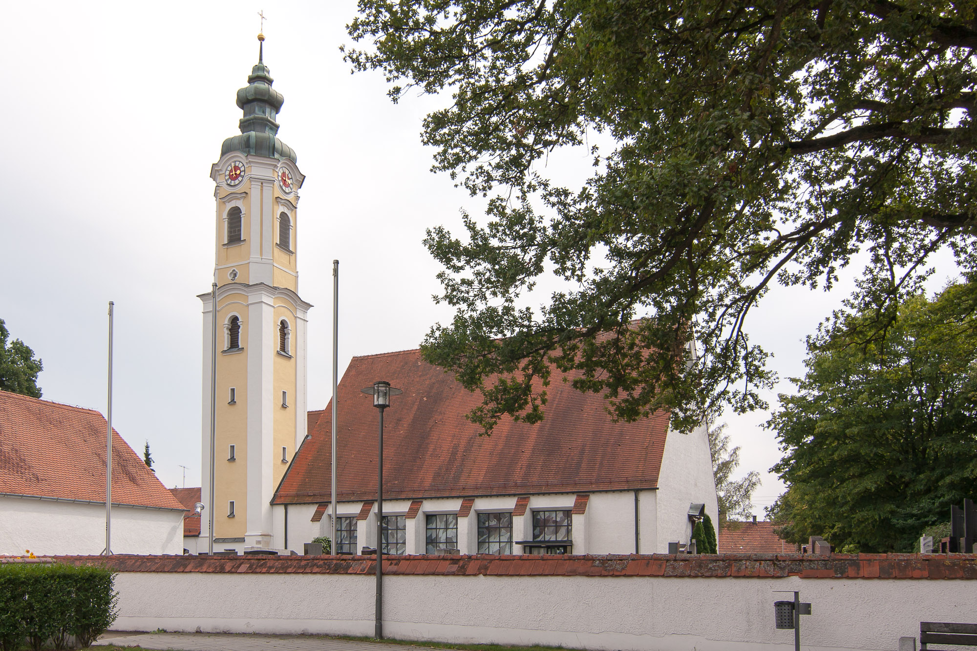 Katholische Pfarrkirche St Martin; Chor um 1500, Turm 1768, (Langhaus 1963/64 von Hansjakob Lill); mit Ausstattung.This is a photograph of an architectural monument.